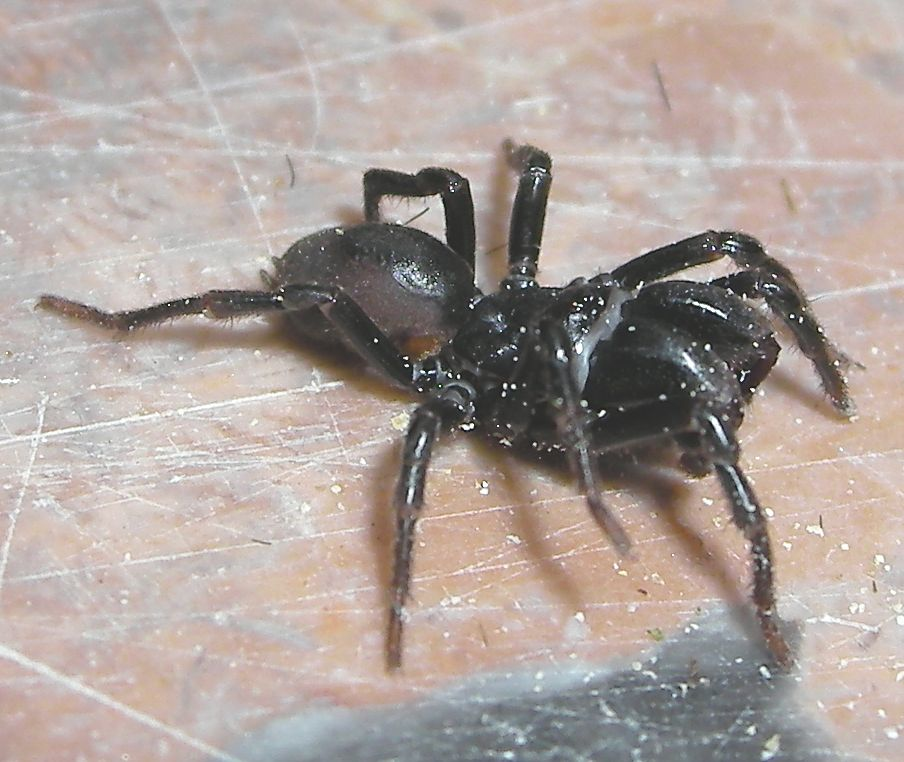 Atypus affinis, Wohnungsfund aus Freudenberg (Postleitzahl 57258) im Siegerland, NRW, Deutschland